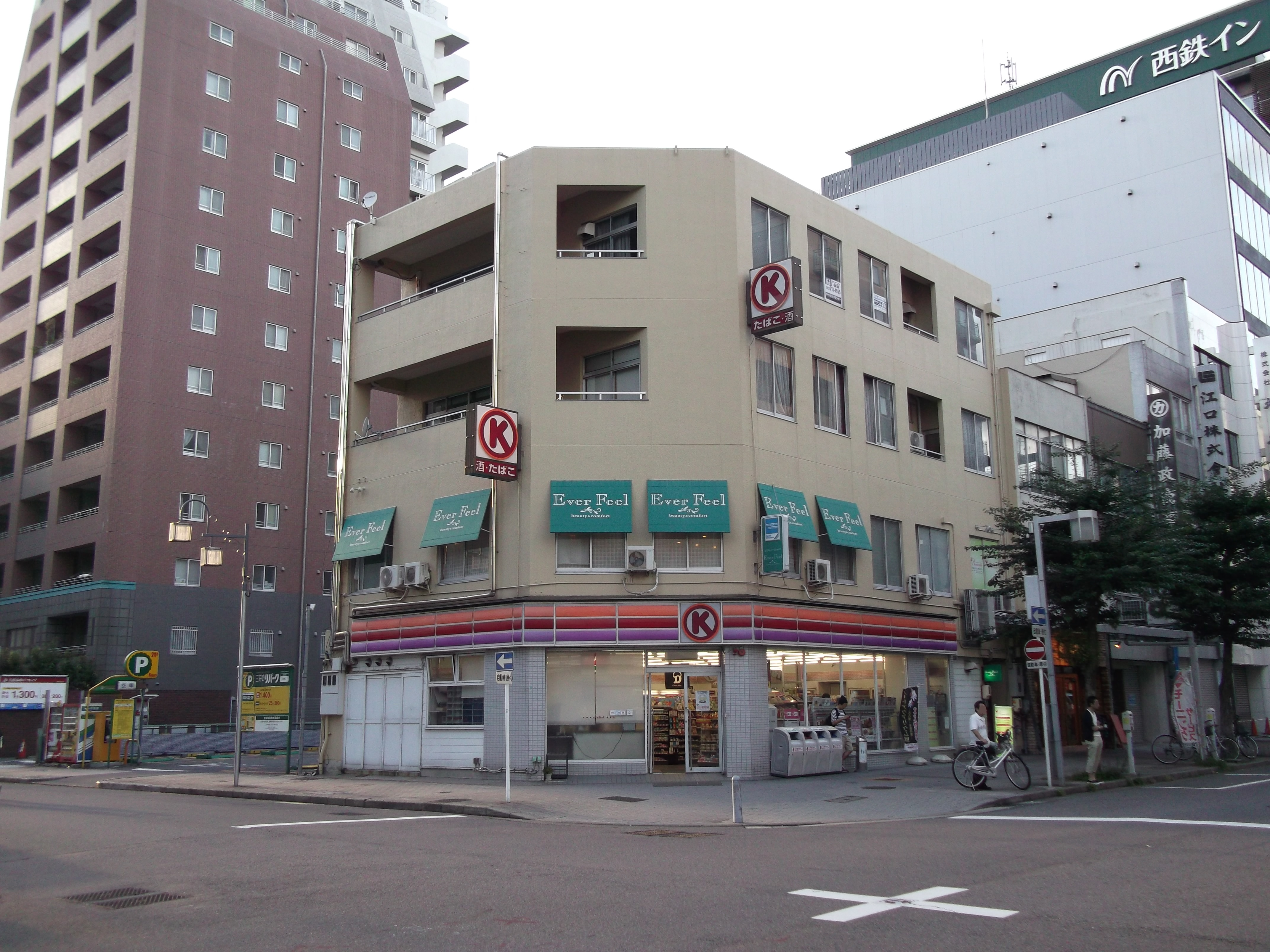 名古屋市中区の大野屋惣八創業地（長島町六丁目本重町西北角）を撮影。人物の顔に加工。